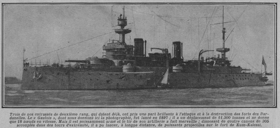 Vue du cuirassé français le Gaulois, de la classe Charlemagne, construit en 1896, coulé en 1916; c'est une vue de l'hebdomadaire Le Pays de France N° 21, page 13.